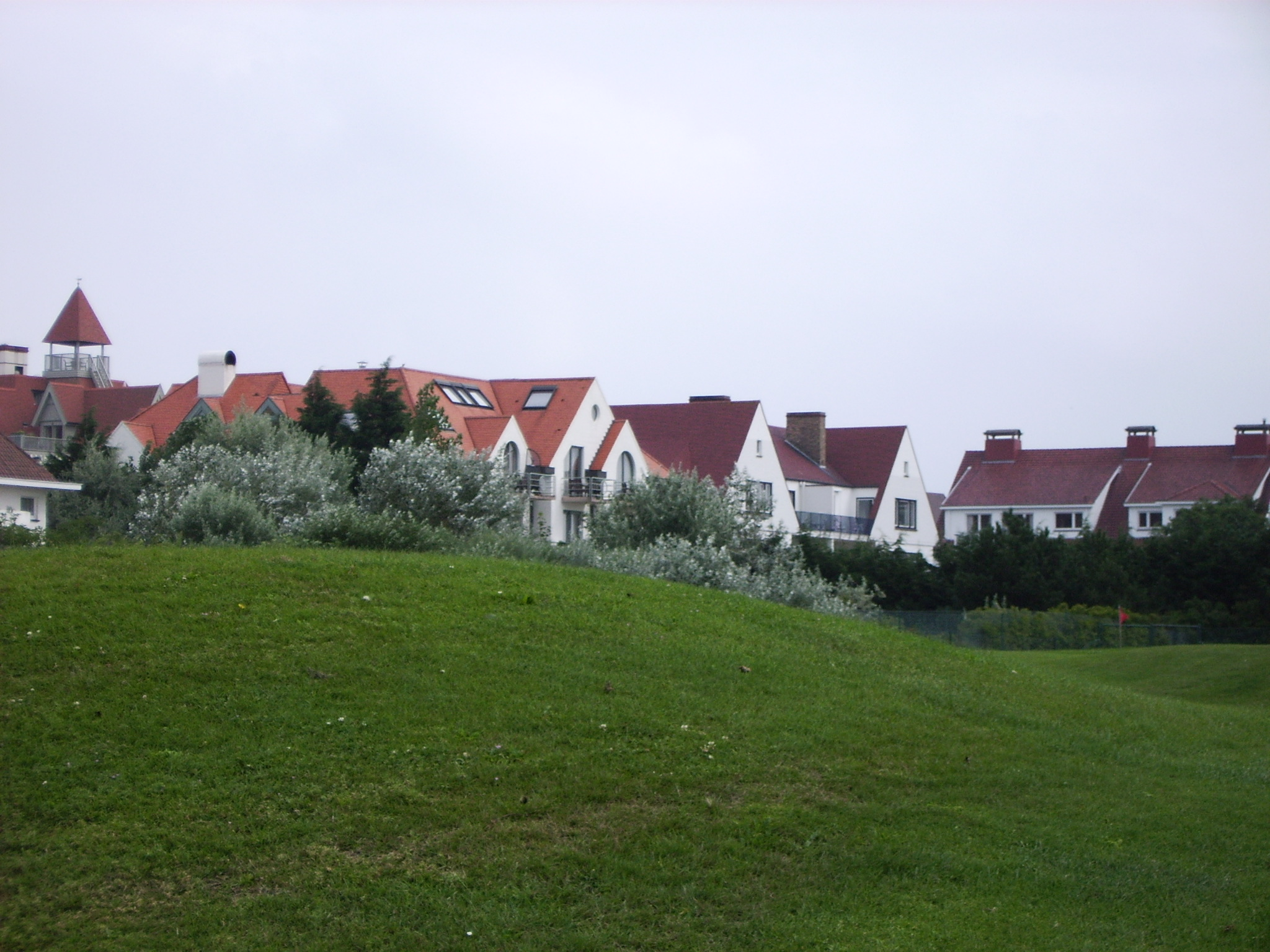 Par juber, approach golf du Zoute